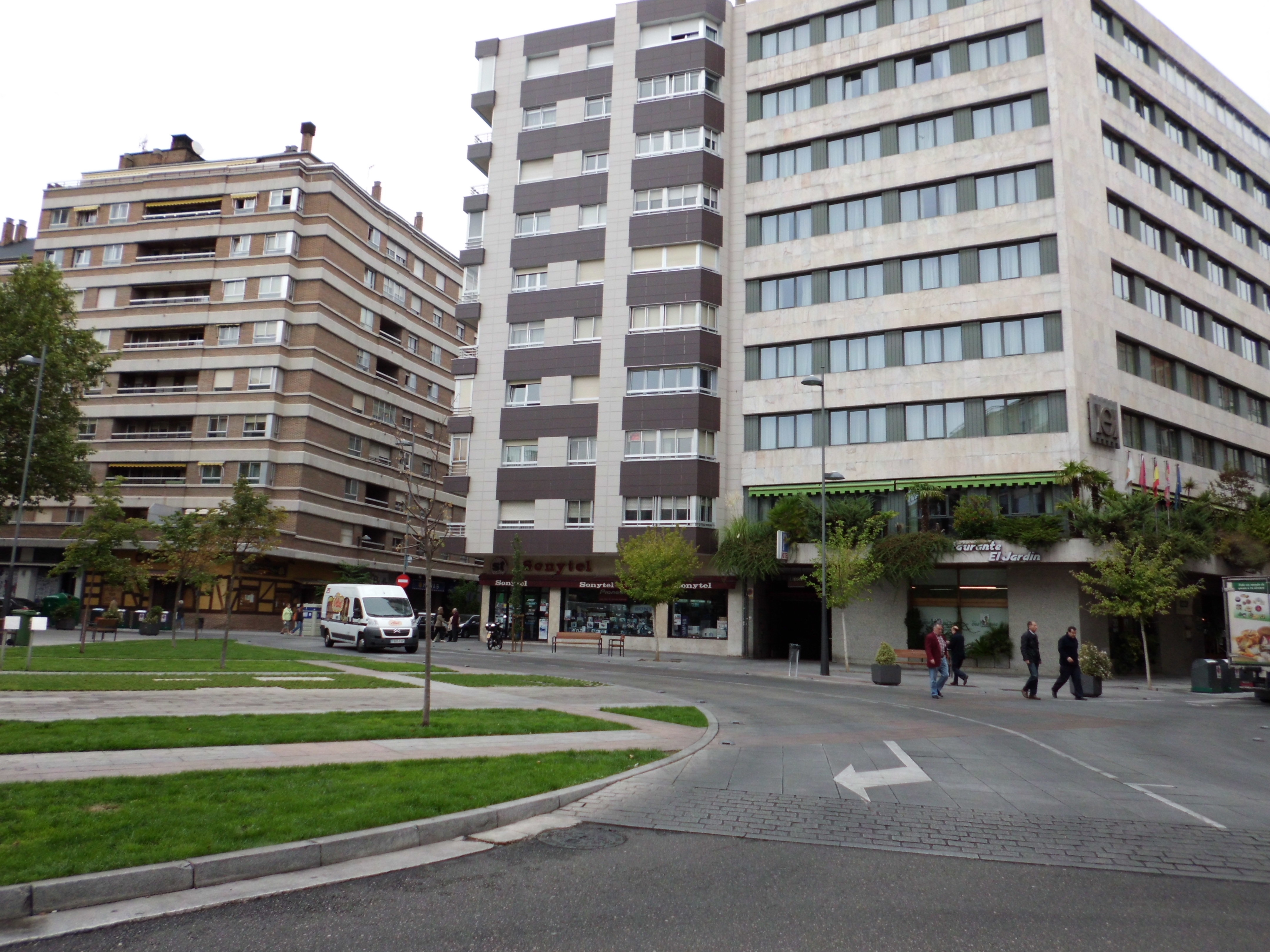 Plaza de San Miguel en Valladolid. El edificio del fondo a la derecha es el hotel Meliá que ocupa el solar donde estuvo el palacio de los Gardoqui hasta su derribo en los años 60 del siglo XX. En el centro de la plaza estaba la iglesia de San Miguel, también desaparecida.